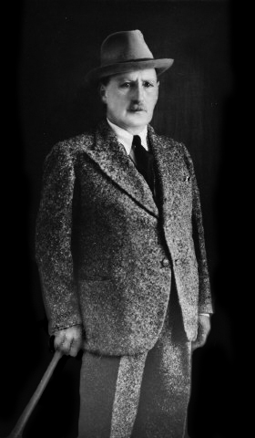 Ingeniero Arthur Posnansky en 1944